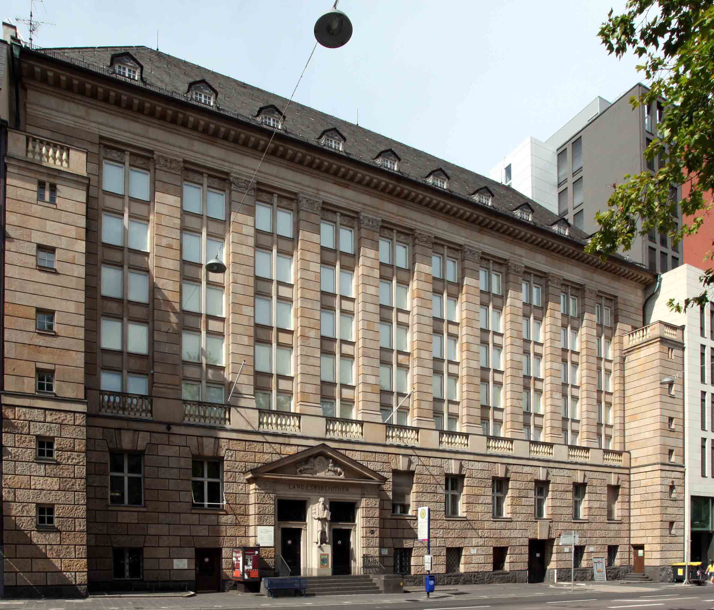 Aussenansicht Landesbibliothek Rheinstr.